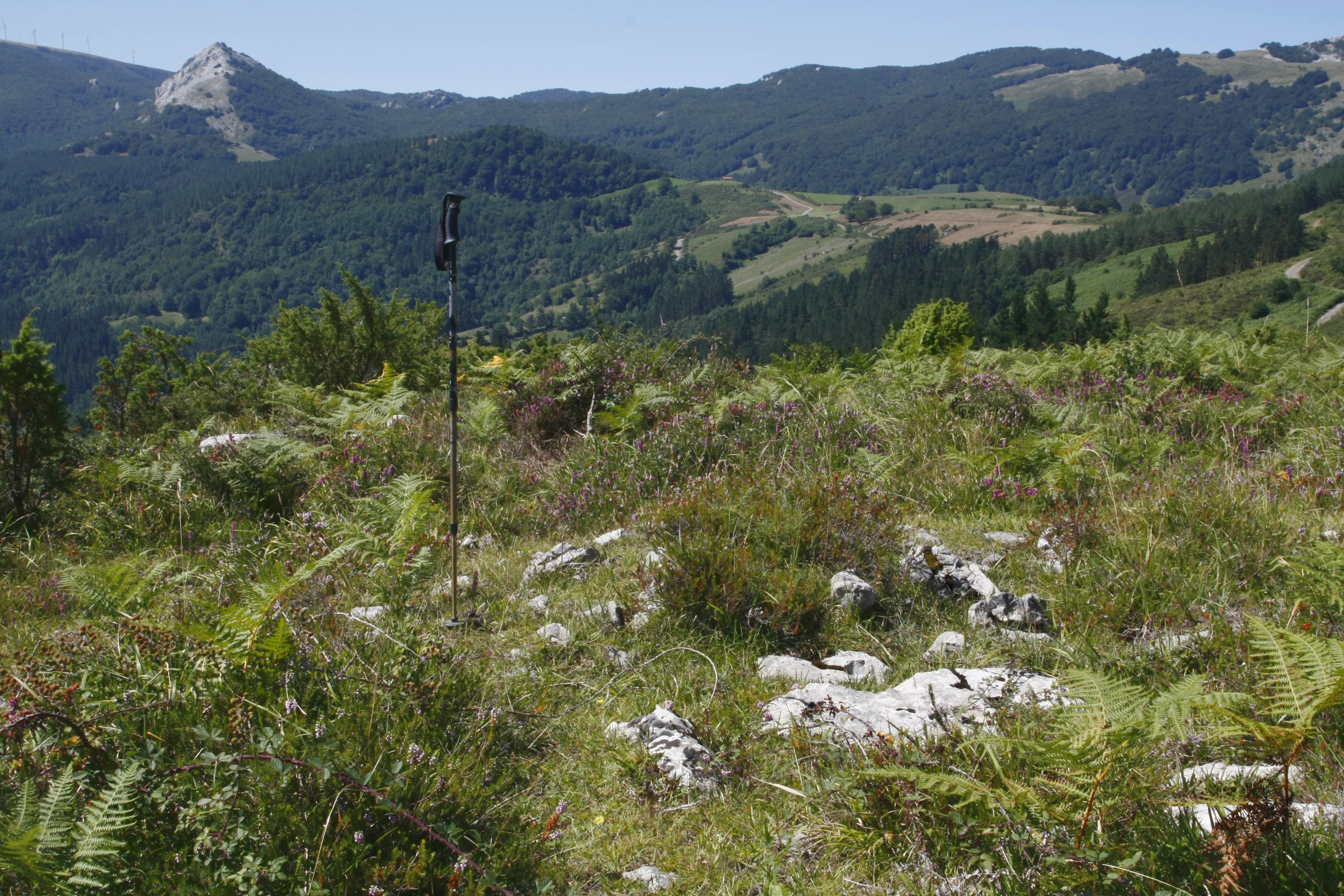 Aitzgain II trikuharria